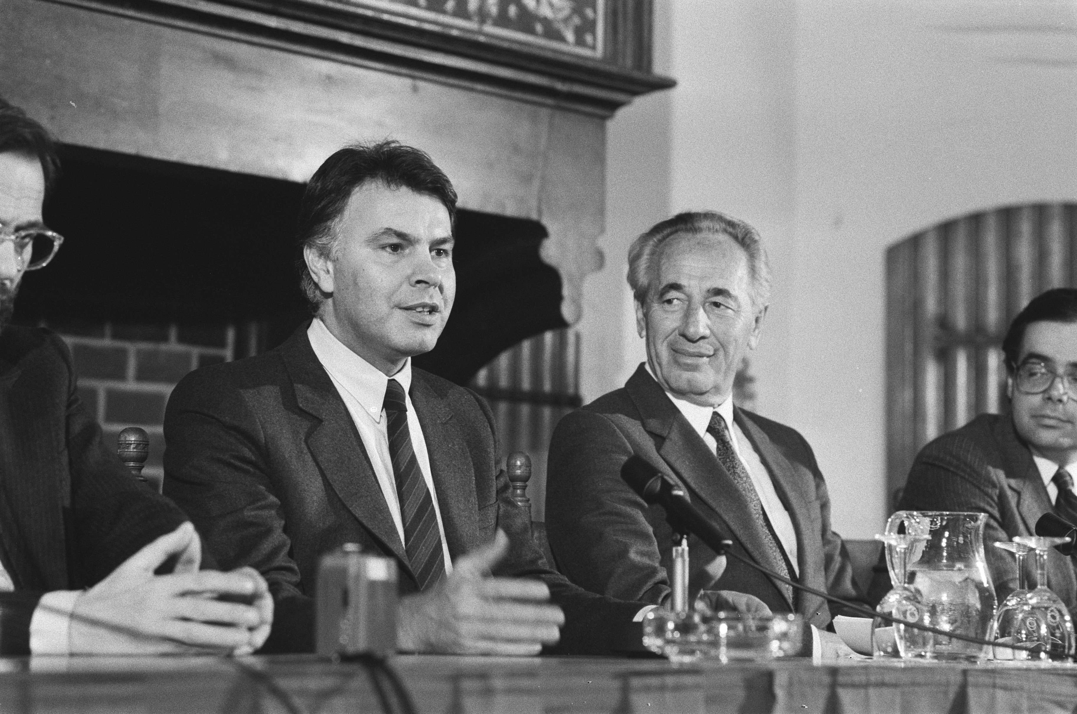 Collectie / Archief : Fotocollectie Anefo Reportage / Serie : Op de vliegbasis Valkenburg arriveerde S. Peres Beschrijving : Gonzalez (links) en Peres (rechts) Datum : 19 januari 1986 Trefwoorden : ministers-presidenten, premiers Persoonsnaam : González, Felipe , Peres, Shimon Fotograaf : Croes, Rob C. / Anefo, [onbekend] Auteursrechthebbende : Nationaal Archief Materiaalsoort : Negatief (zwart/wit) Nummer archiefinventaris : bekijk toegang 2.24.01.05 Bestanddeelnummer : 933-5415